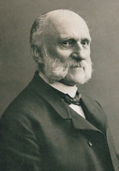 Portrait Freiherr Carl von Wagner, founder of Corps Altsachsen Dresden